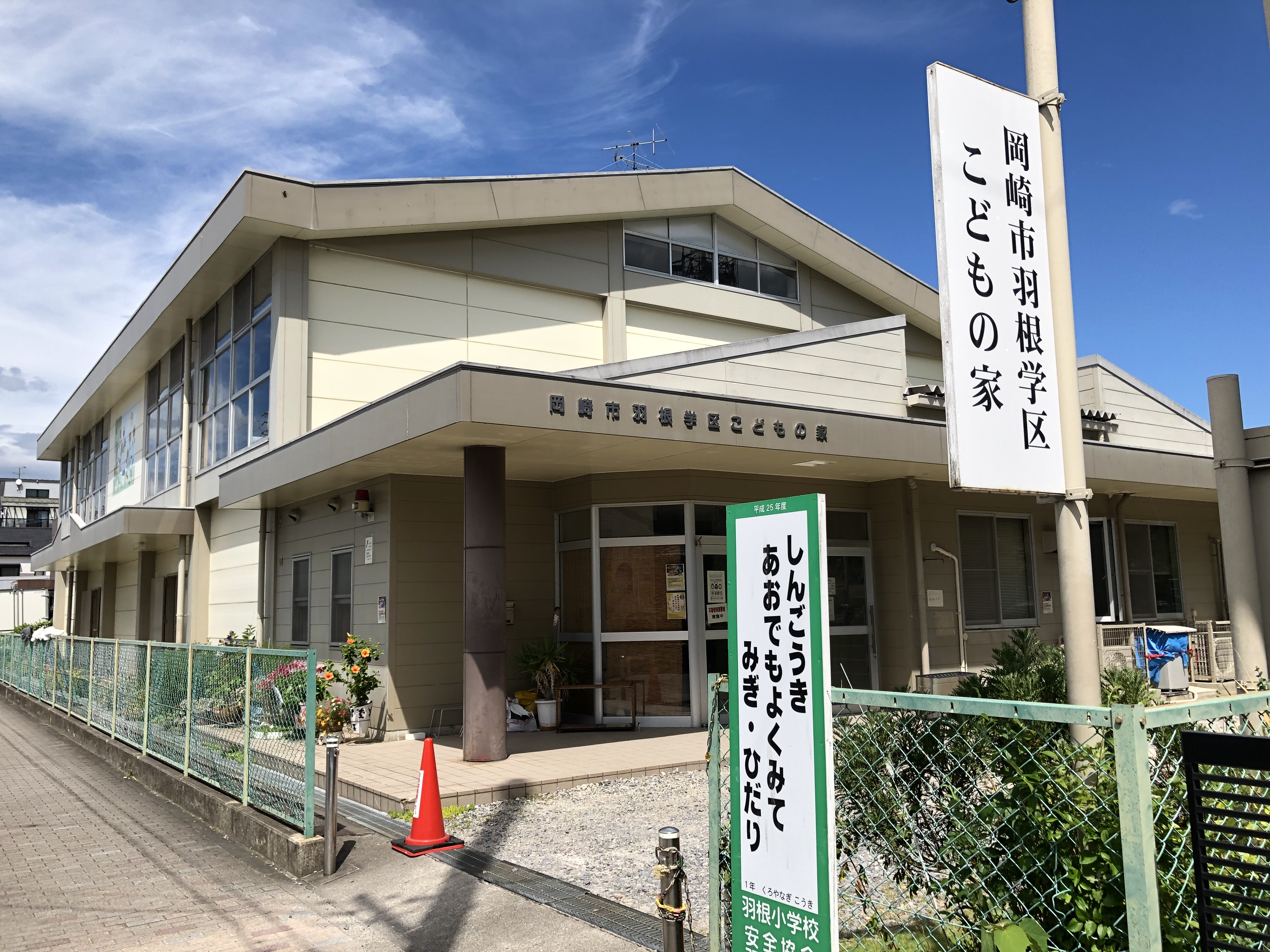 岡崎市羽根学区こどもの家（岡崎市羽根町）